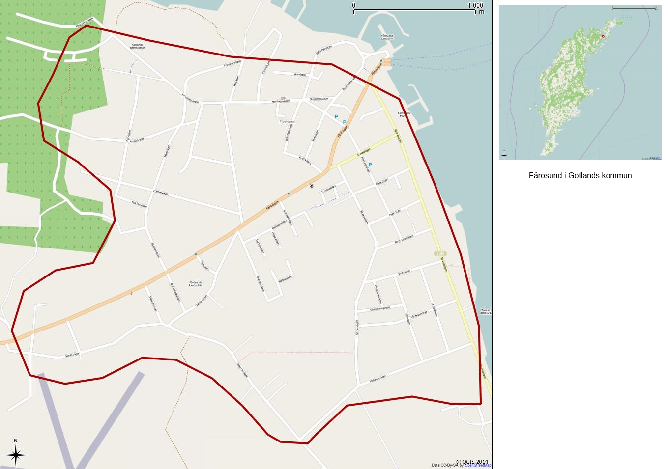 Tätorten Fårösunds gränser 1990 enligt Atlas över rikets indelningar 1992.